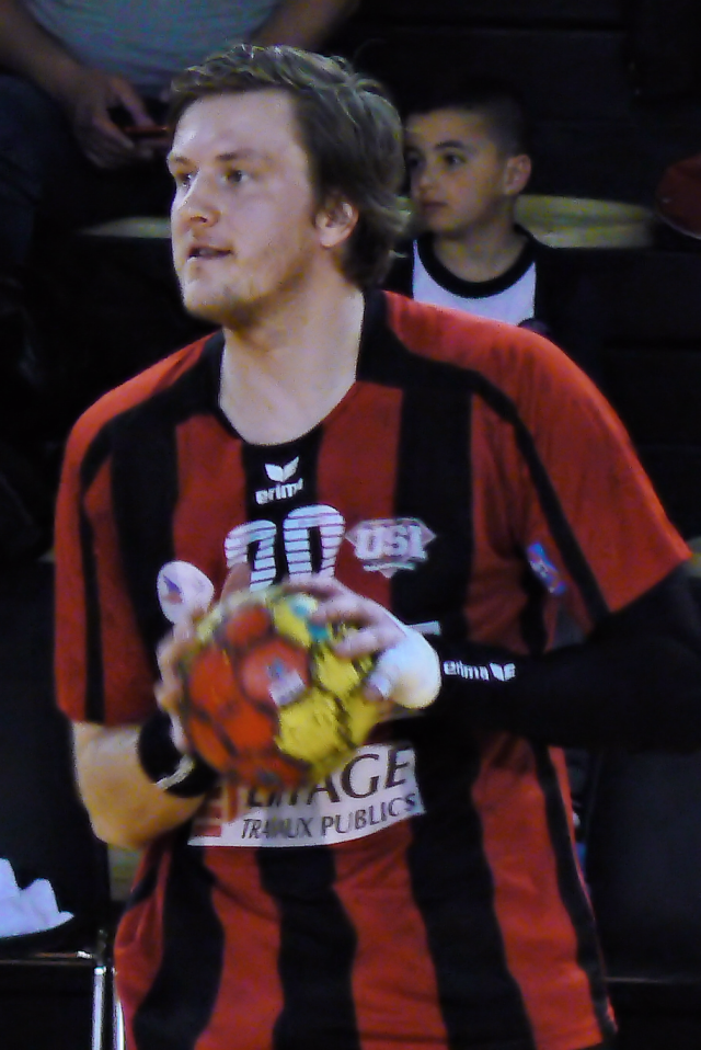 Ondřej Šulc l'arrière droit de l'US Ivry, lors du match contre le Fenix Toulouse Handball, le 15 mars 2014